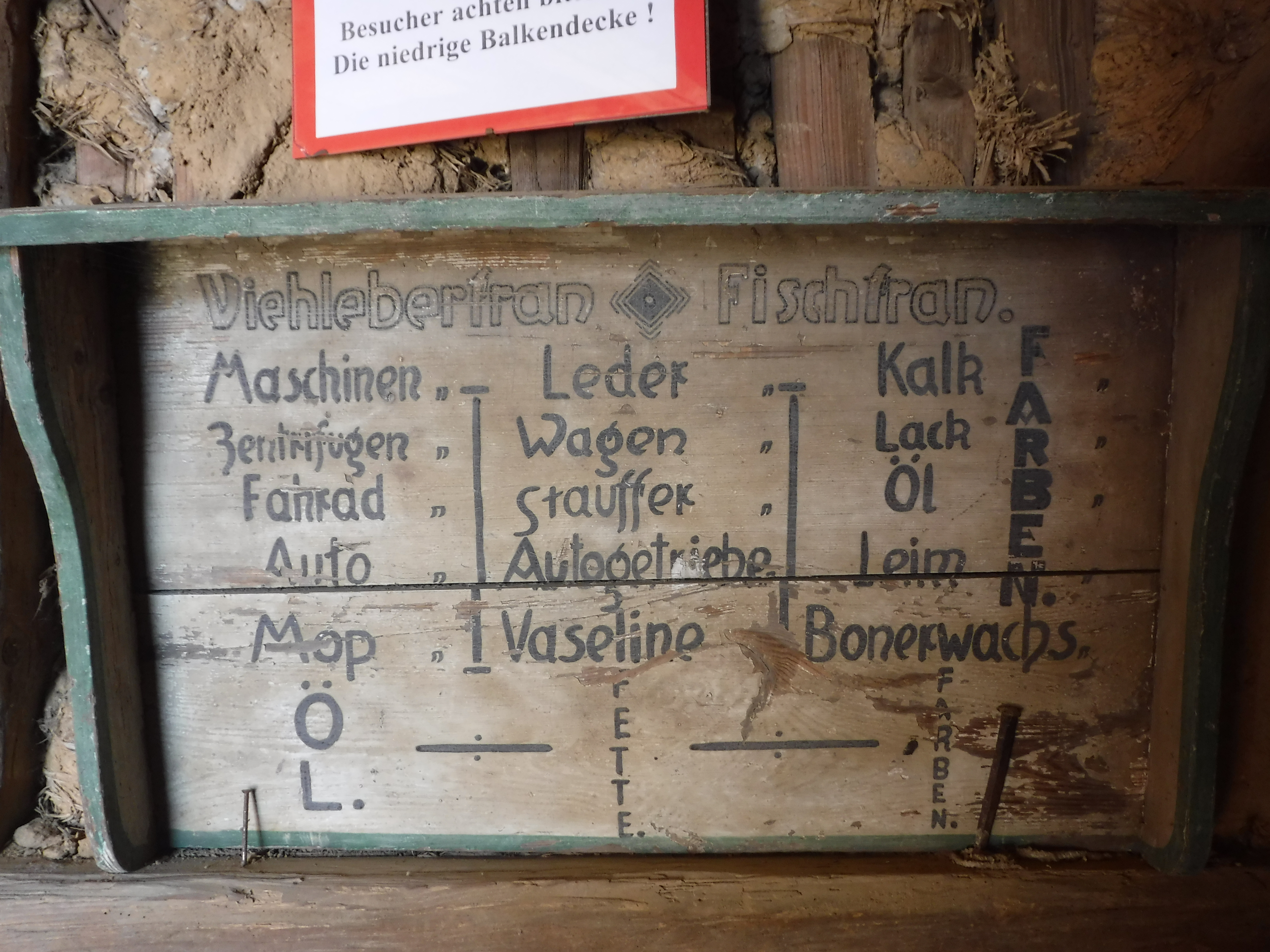 Werbeschild für Viehlebertran und Fischtran im Kleinbauernmuseum Dresden-Reitzendorf